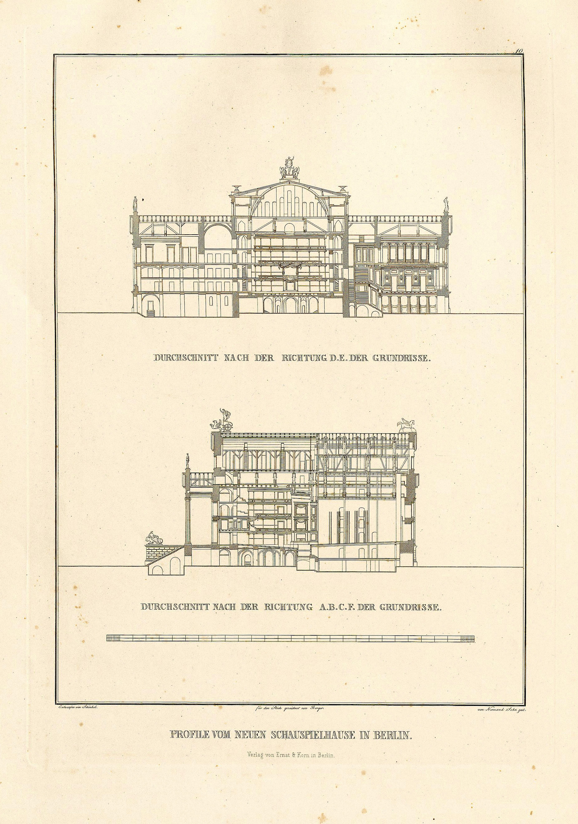 Schauspielhaus Berlin, Schnitte von Karl Friedrich Schinkel